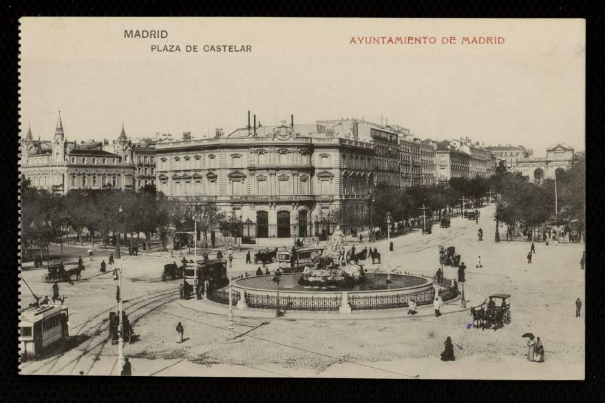 "MADRID / PLAZA DE CASTELAR / AYUNTAMIENTO DE MADRID "(Anverso) "Fototipia Hauser y Menet.Madrid" (Reverso) Cartulina blanco y negro 9 x 14 cm.